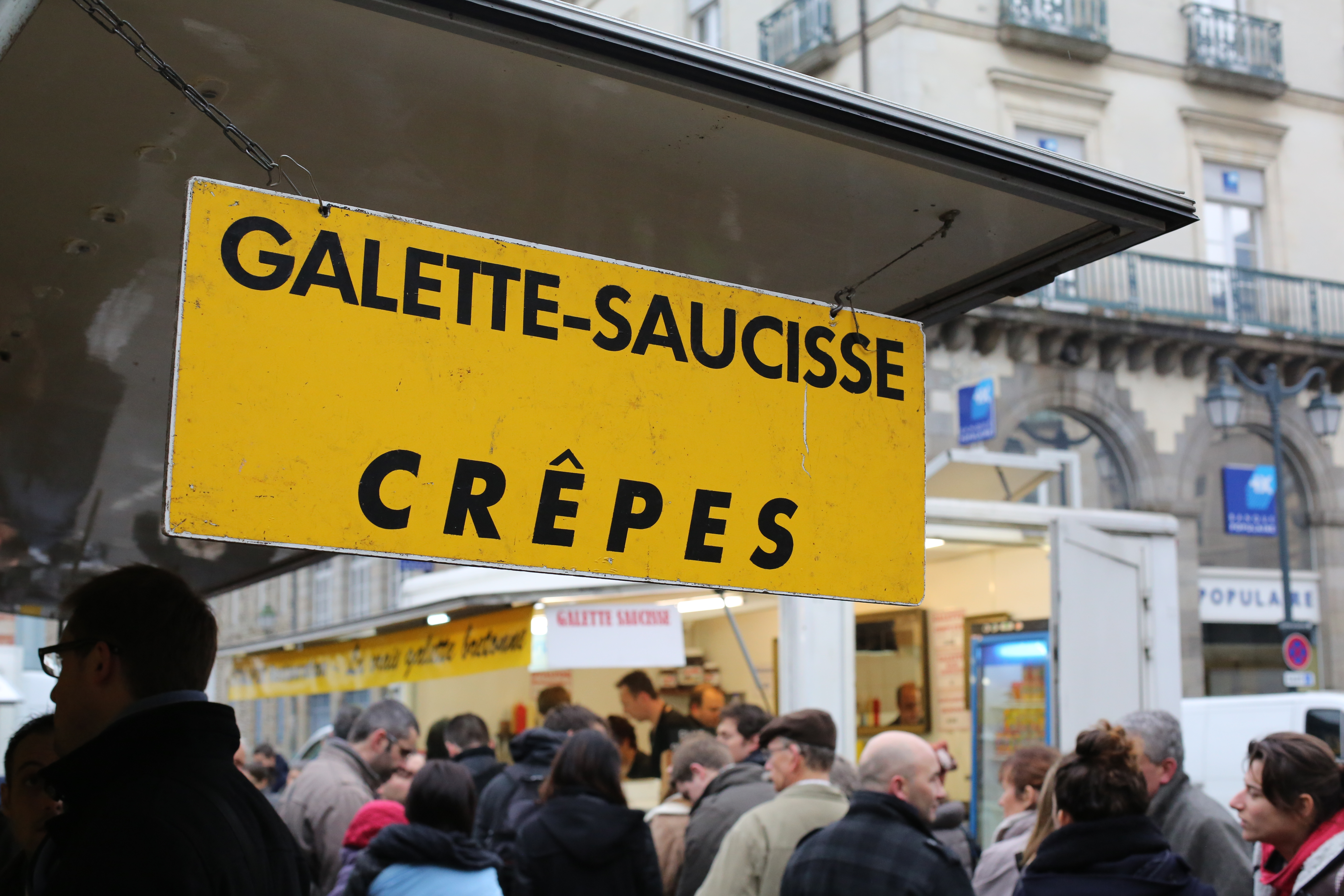 Vente de Galette saucisse sur le marché des Lices à Rennes le 29 décembre 2012.